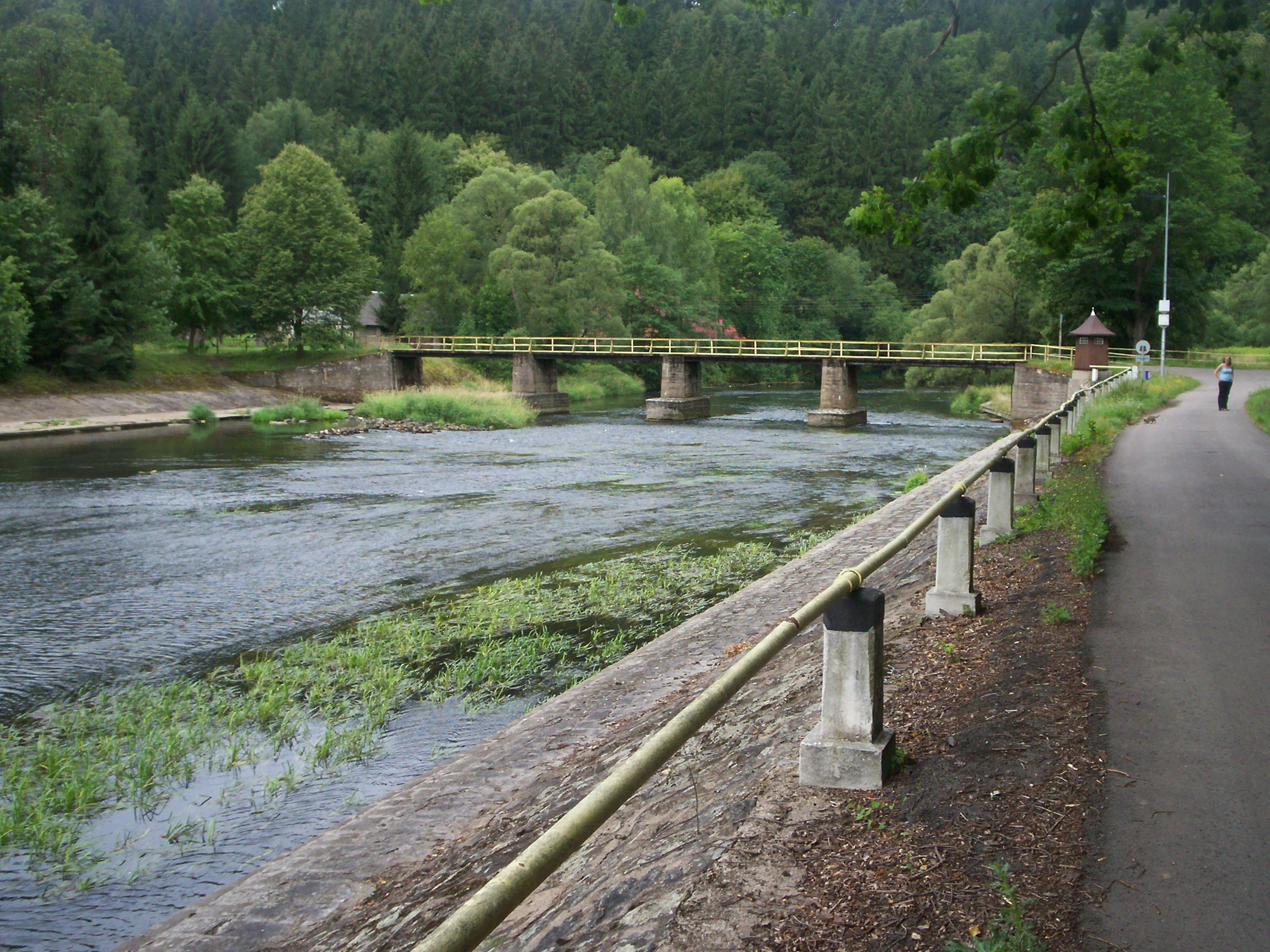 Rzeka Bóbr w Pilchowicach